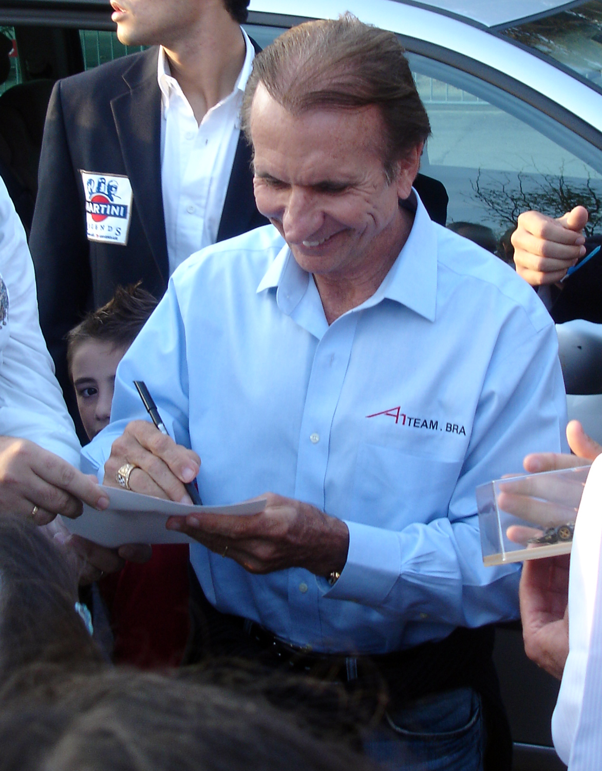 Emerson Fittipaldi, expilot de Fórmula 1 (durant l'acte de commemoració del "Circuit de Montjuïc").